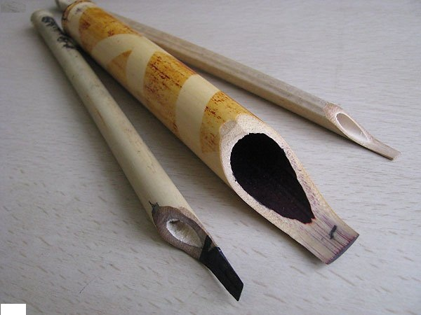 Қазақша (кирил): Қалам